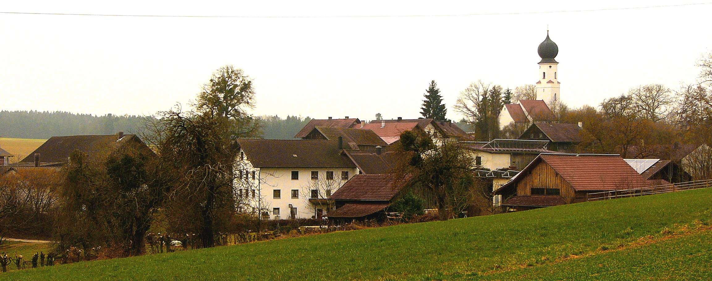 Piegendorf, Ortsteil von Loiching.